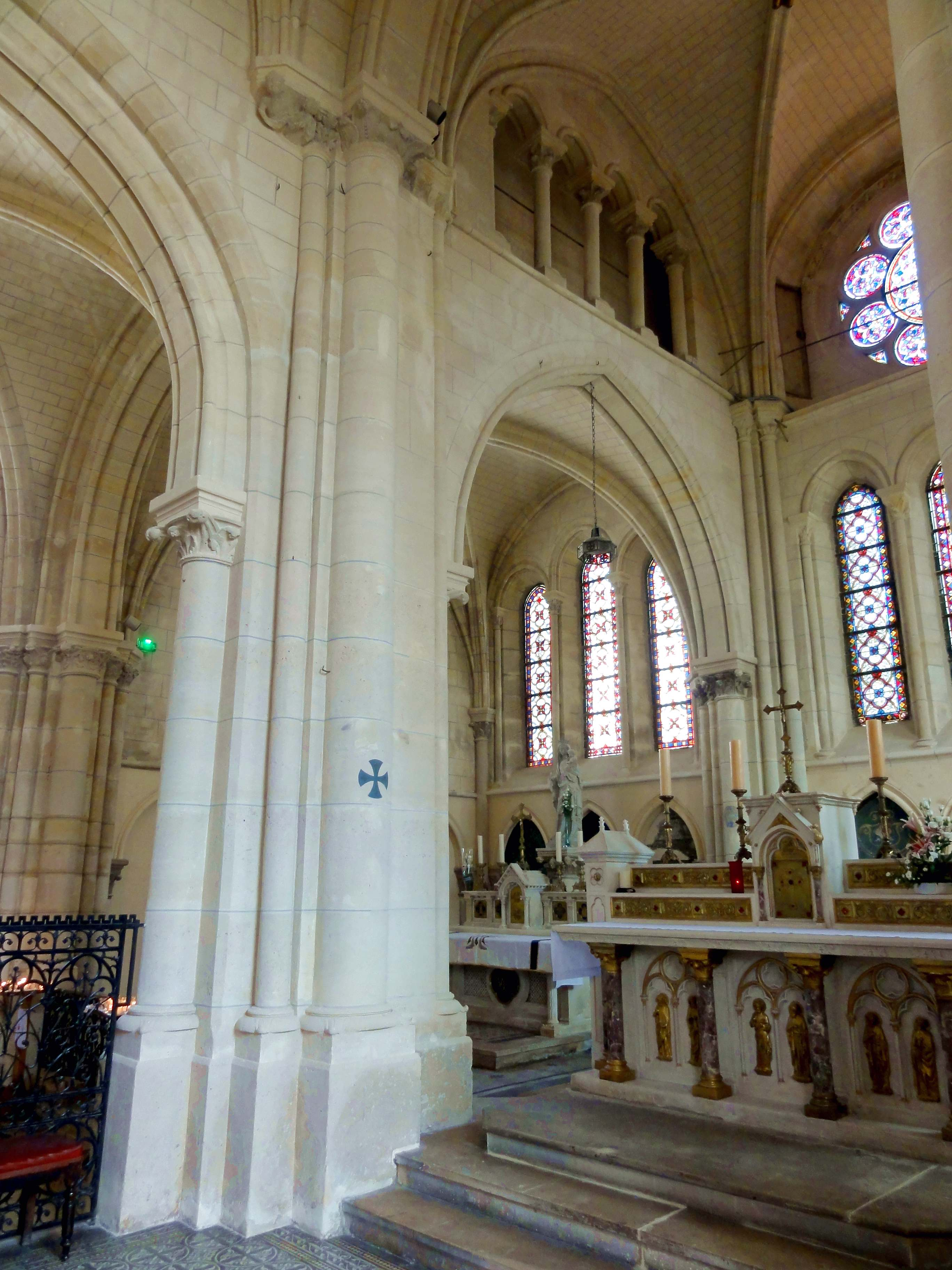 Intérieur de l'église - voir titre.